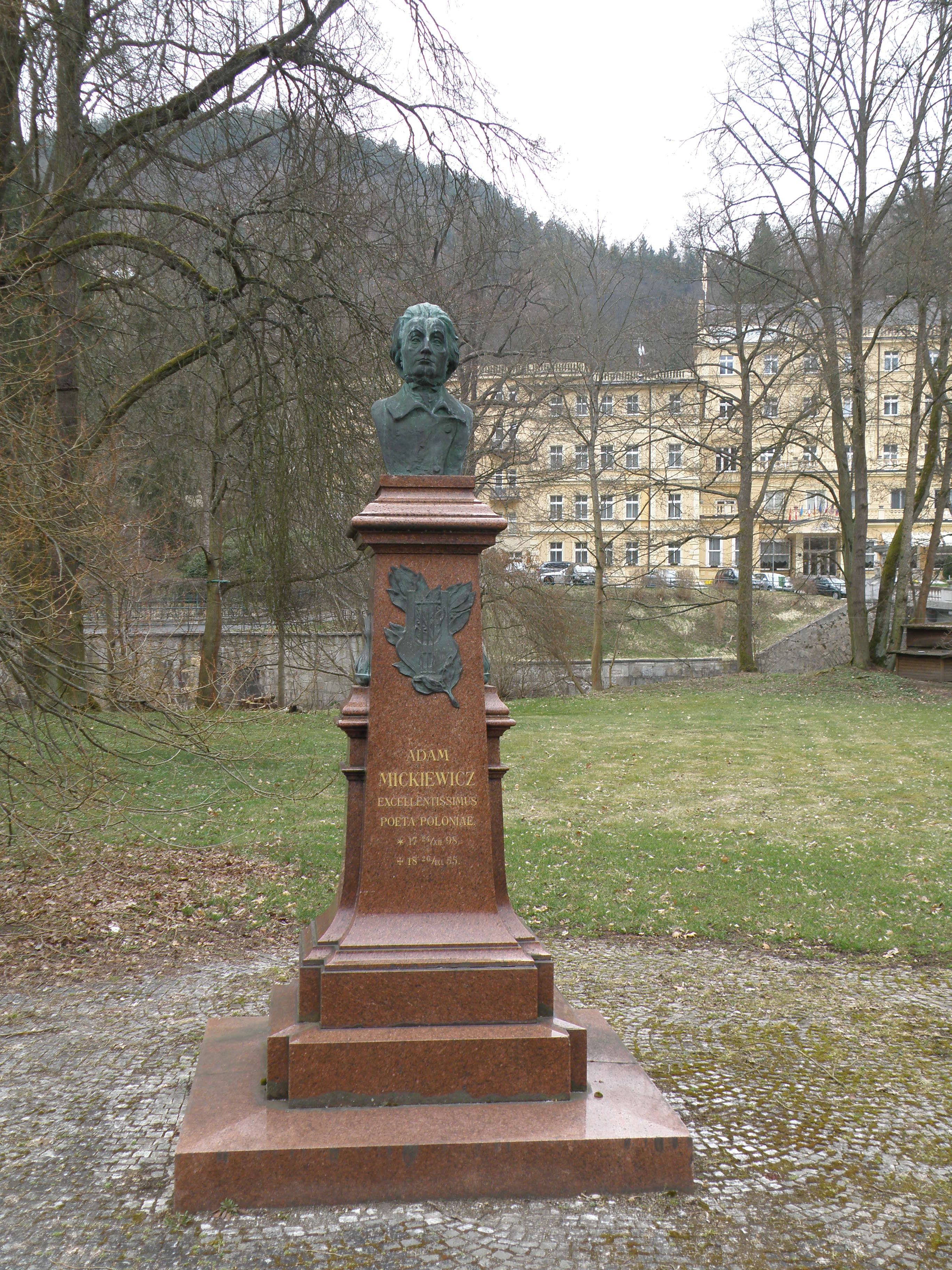 Busta Adama Mickiewicze